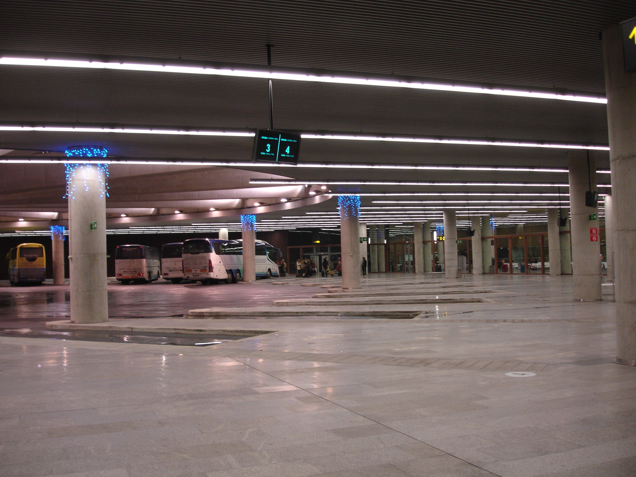 Interior de la estación de autobuses de Pamplona (Navarra, Spain)